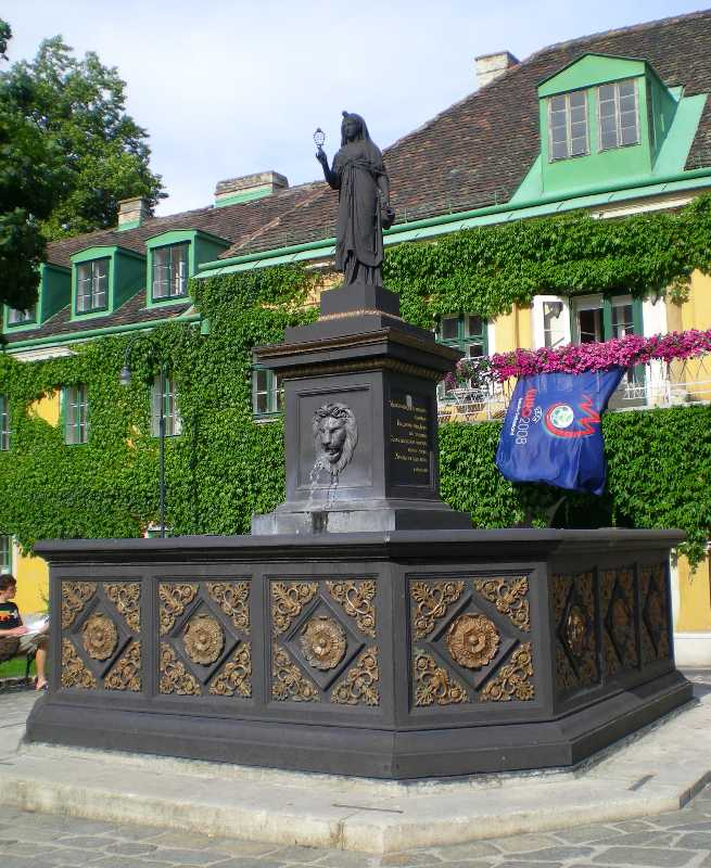 Der Isisbrunnen auf dem Albertplatz in Wien-Josefstadt. Der einzige Brunnen aus Gusseisen in der Stadt